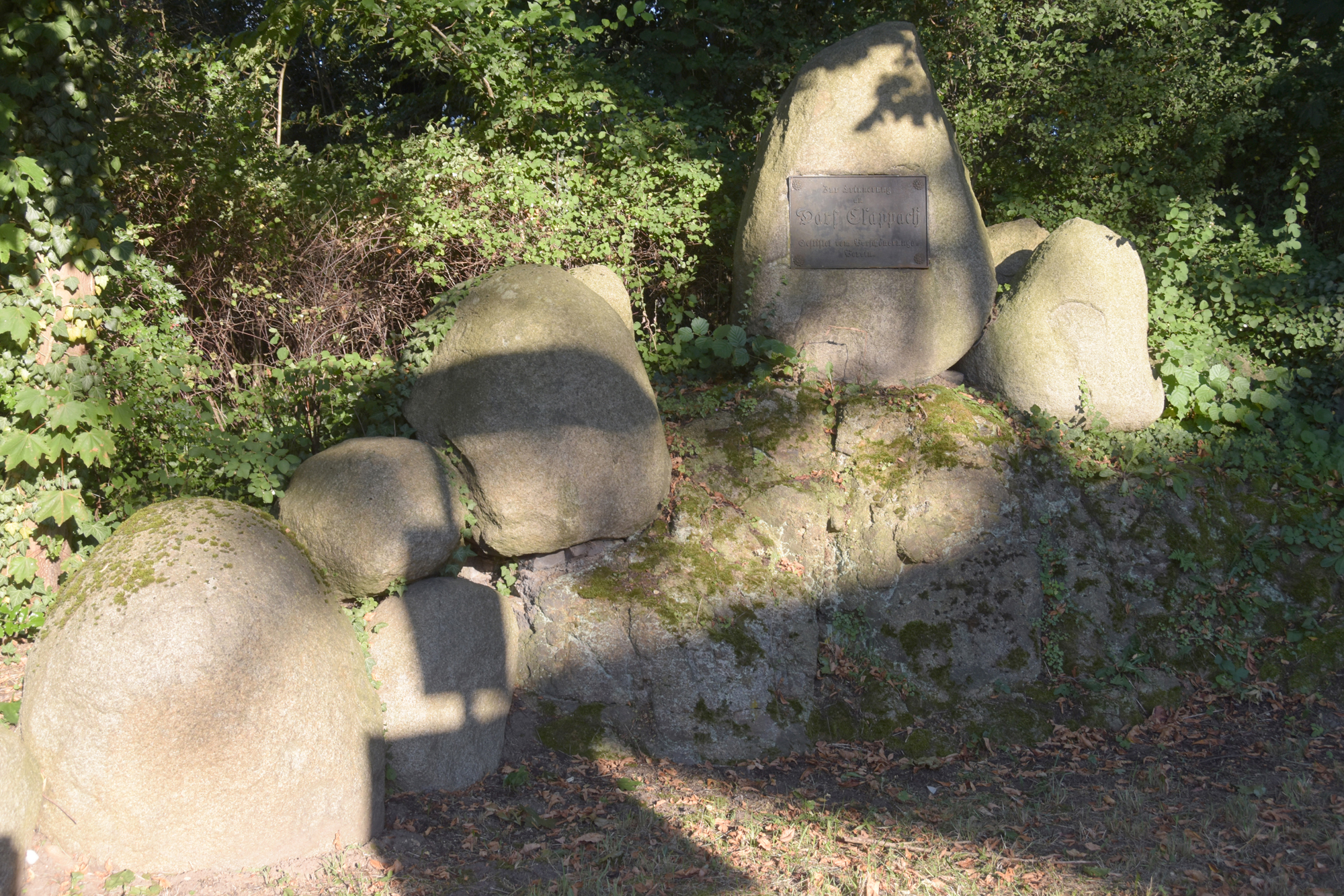 Denkmalgeschützter Gedenkstein erinnernd an das Dorf Clappach, gestiftet vom Verschönerungsverein um 1870